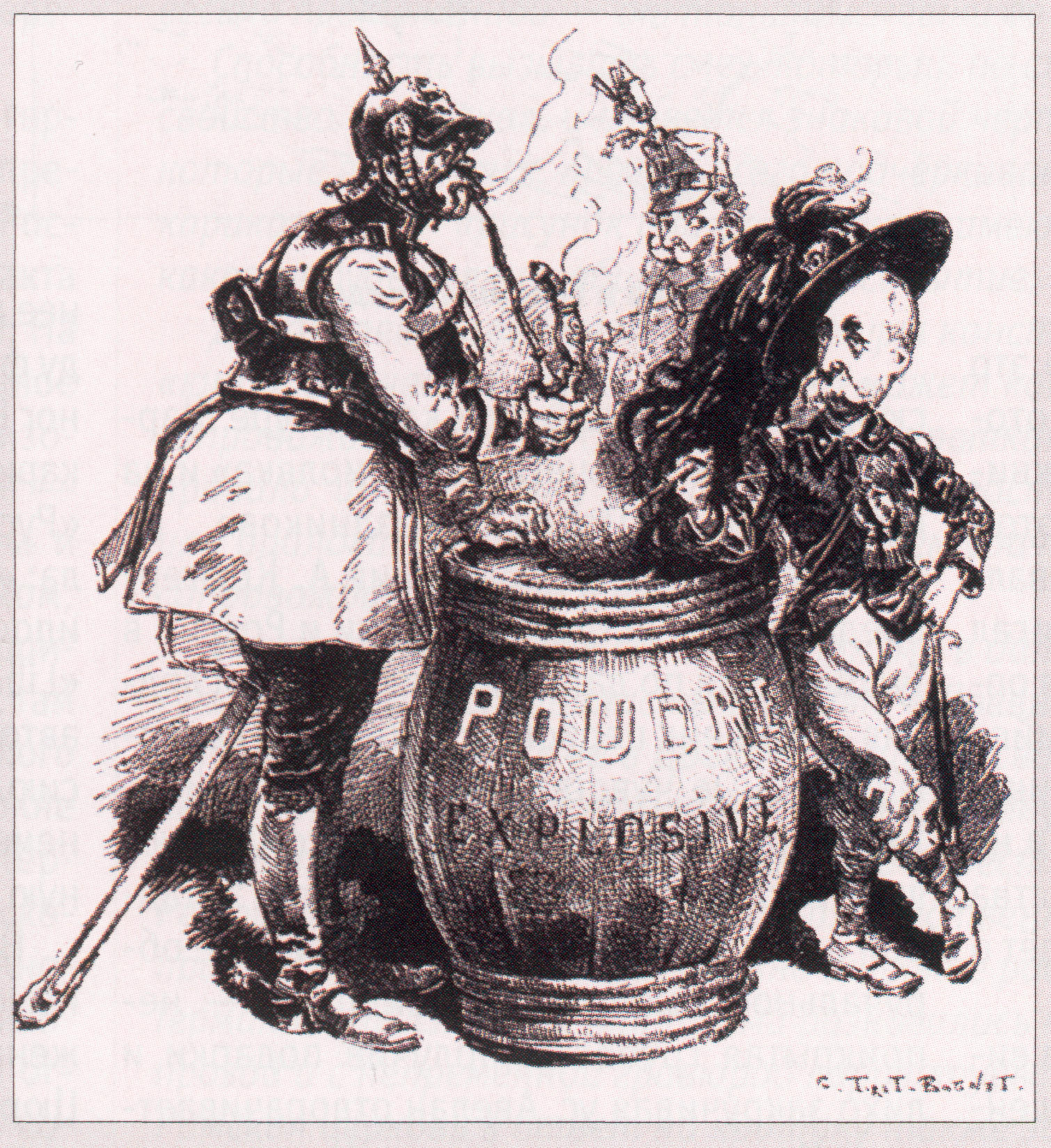 Тире-Боне. Друзья мира (Тройственный союз). Карикатура. Изображены курящие на бочке с порохом Германия (бош в пикельхельме (каске с шишаком), похож на Бисмарка), Австрия (высокий офицер) и Италия в шляпе с пером (портретное сходство с премьер-министром Франческо Криспи).